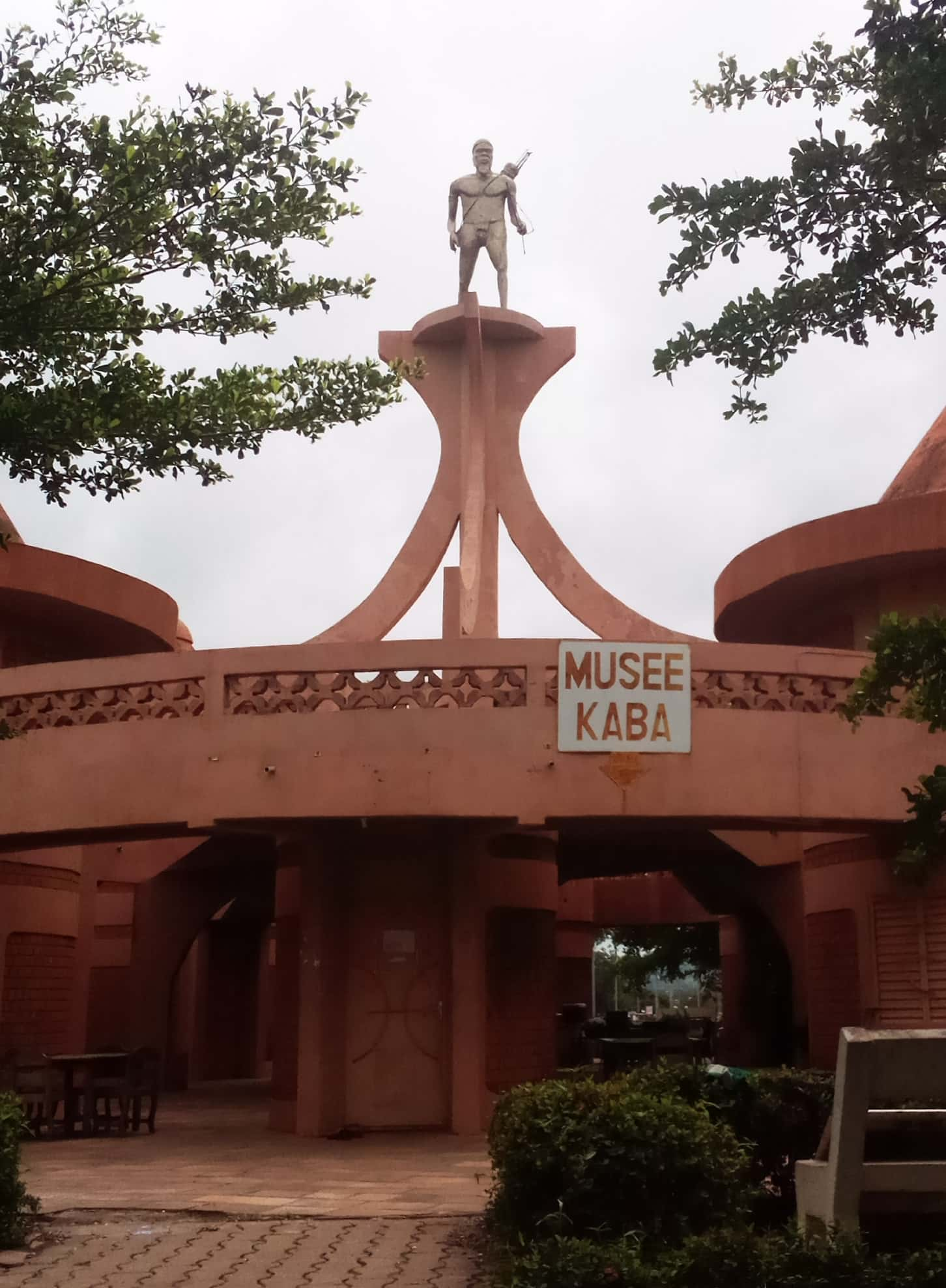 mussé kaba est situé à la sortie de natitingou allant vers Djougou.KABA était un guerrier du nord Bénin(Atacora) pendant les résistances africaine.